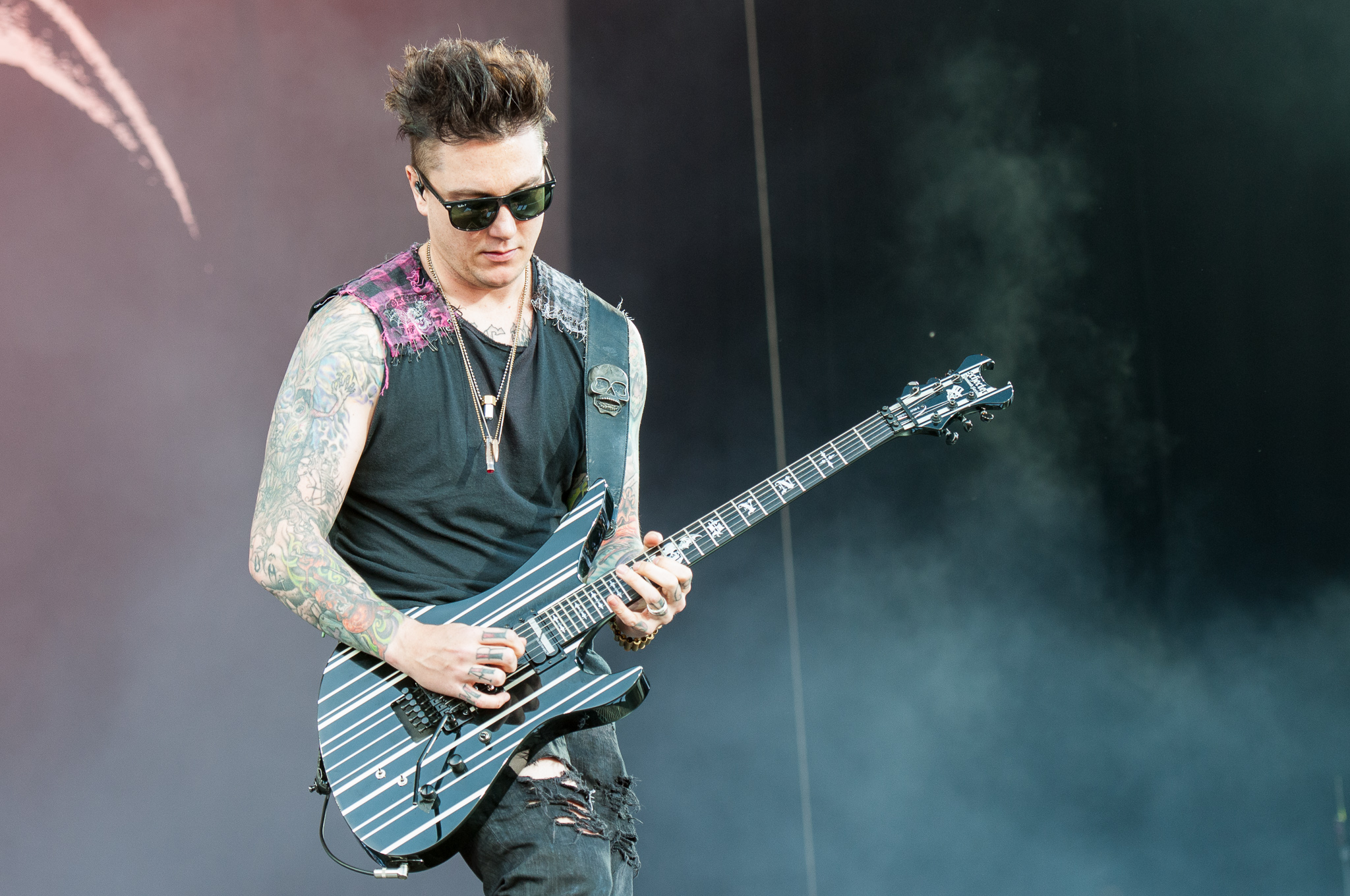 ARGO-Konzerte,Avenged Sevenfold,Brian Elwin Haner Jr.,Konzert,Livekonzert,Livemusik,Musik,RiP,Rock im Park 2014,Synyster Gates